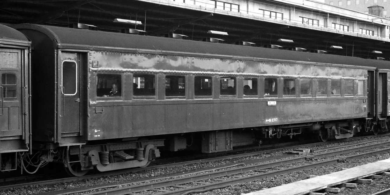 JNR Passenger car, at Aidu-Wakamatsu Sta. Banetsu-West Line, Fukushima Pref. 国鉄オハ61 2717（仙コリ）、磐越西線会津若松駅にて。